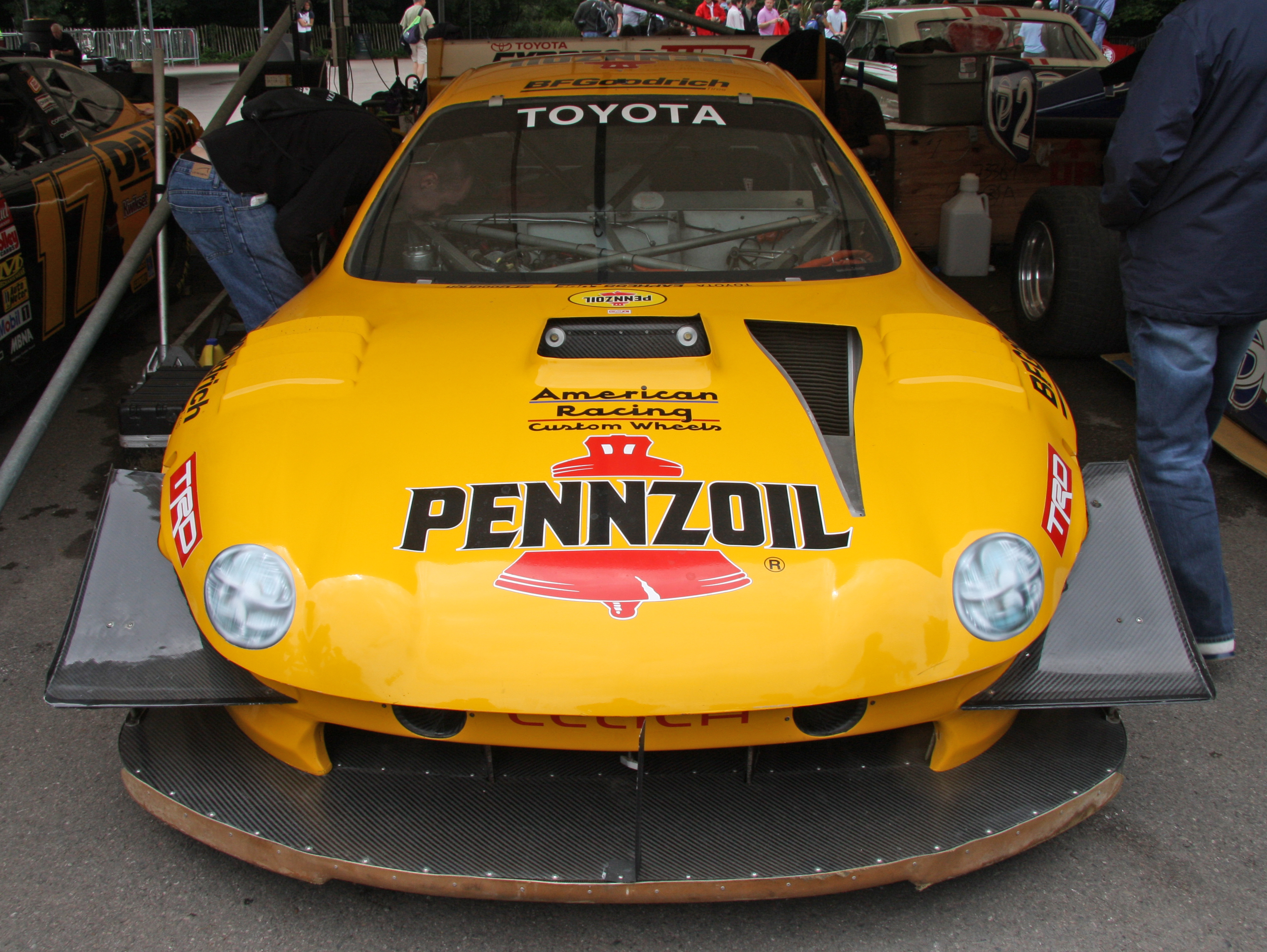 Built 1994. 2 litre 4 cylinder